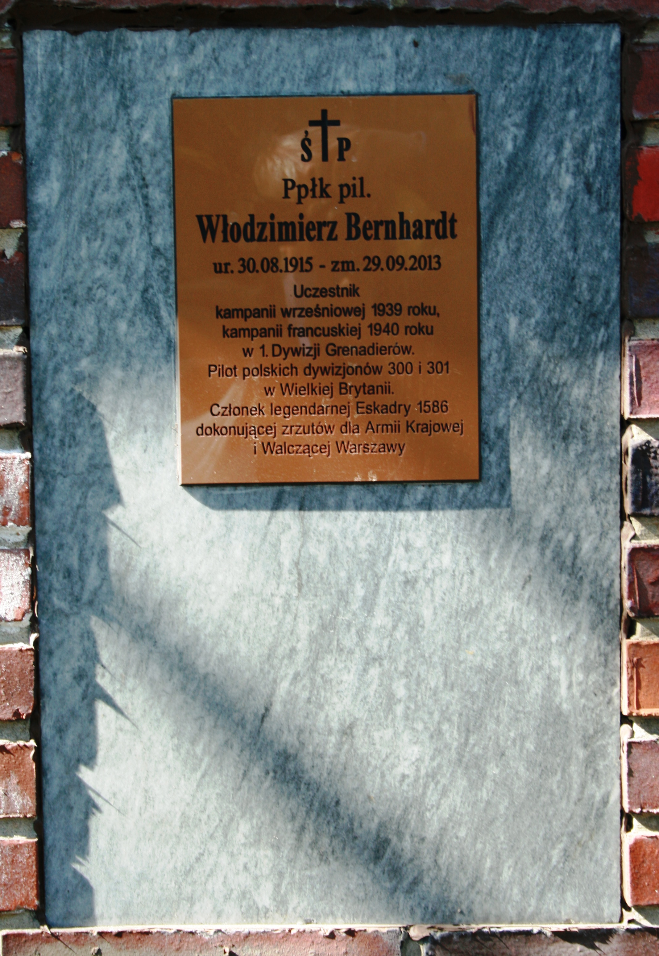 Kwatera I Samodzielnej Brygady Spadochronowej na Powązkach Wojskowych w Warszawie